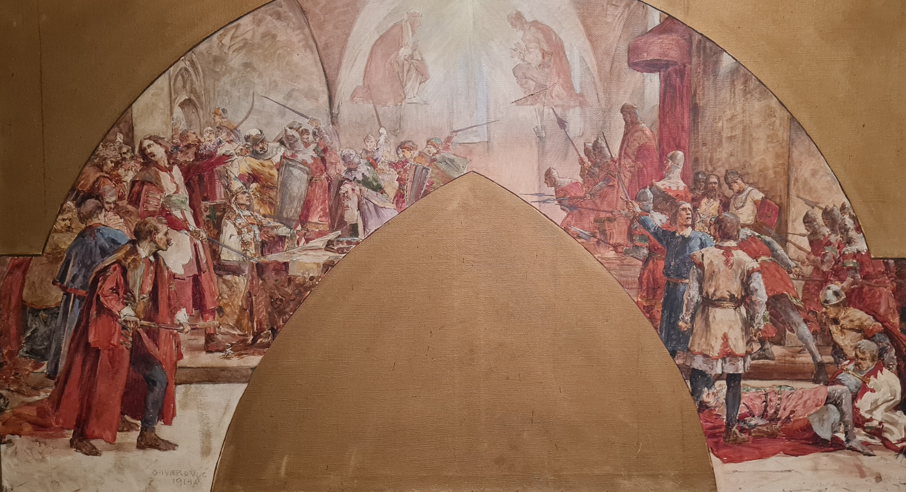 slika Otona Ivekovića "Krvavi_sabor_križevački"